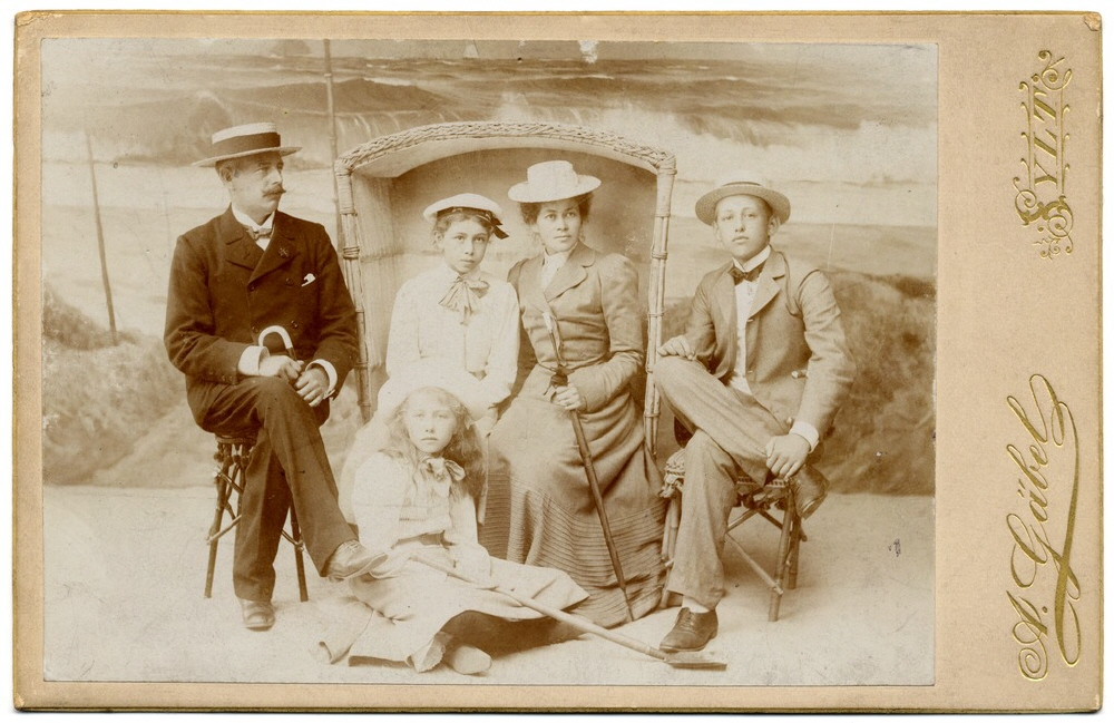 Wilhelm och Ebba von Eckermann med sina barn